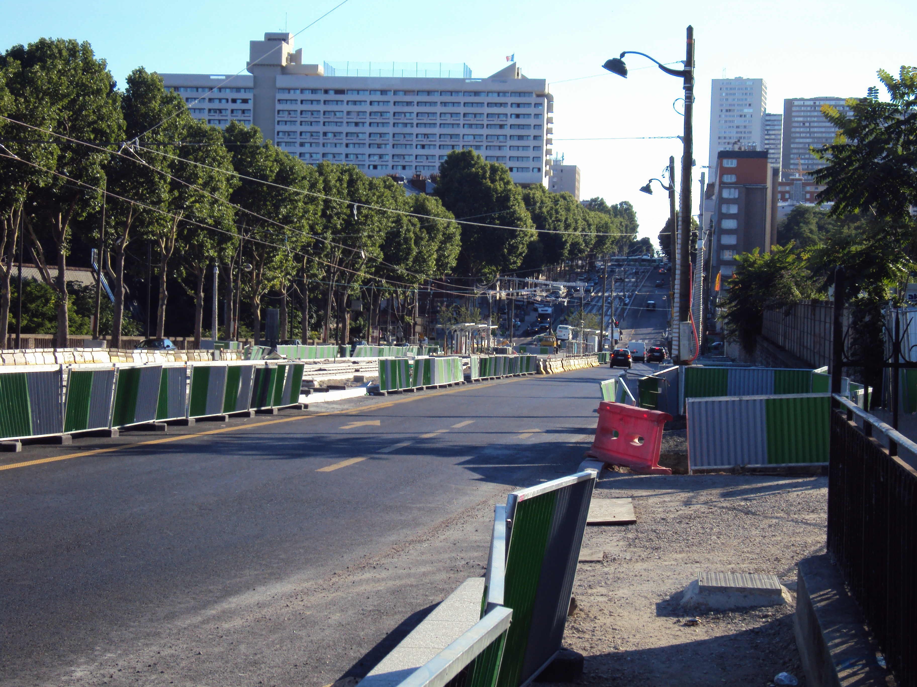 Travaux extension T3 - Entre Avenue de France et Maryse Bastie